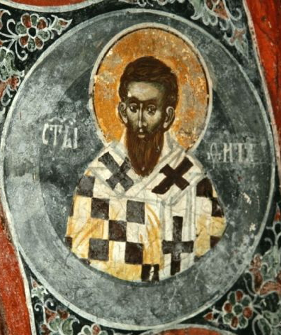 Святой Апостол Тит Критский Косово, XIV век. Печь Патриаршия. Церковь св. Николая